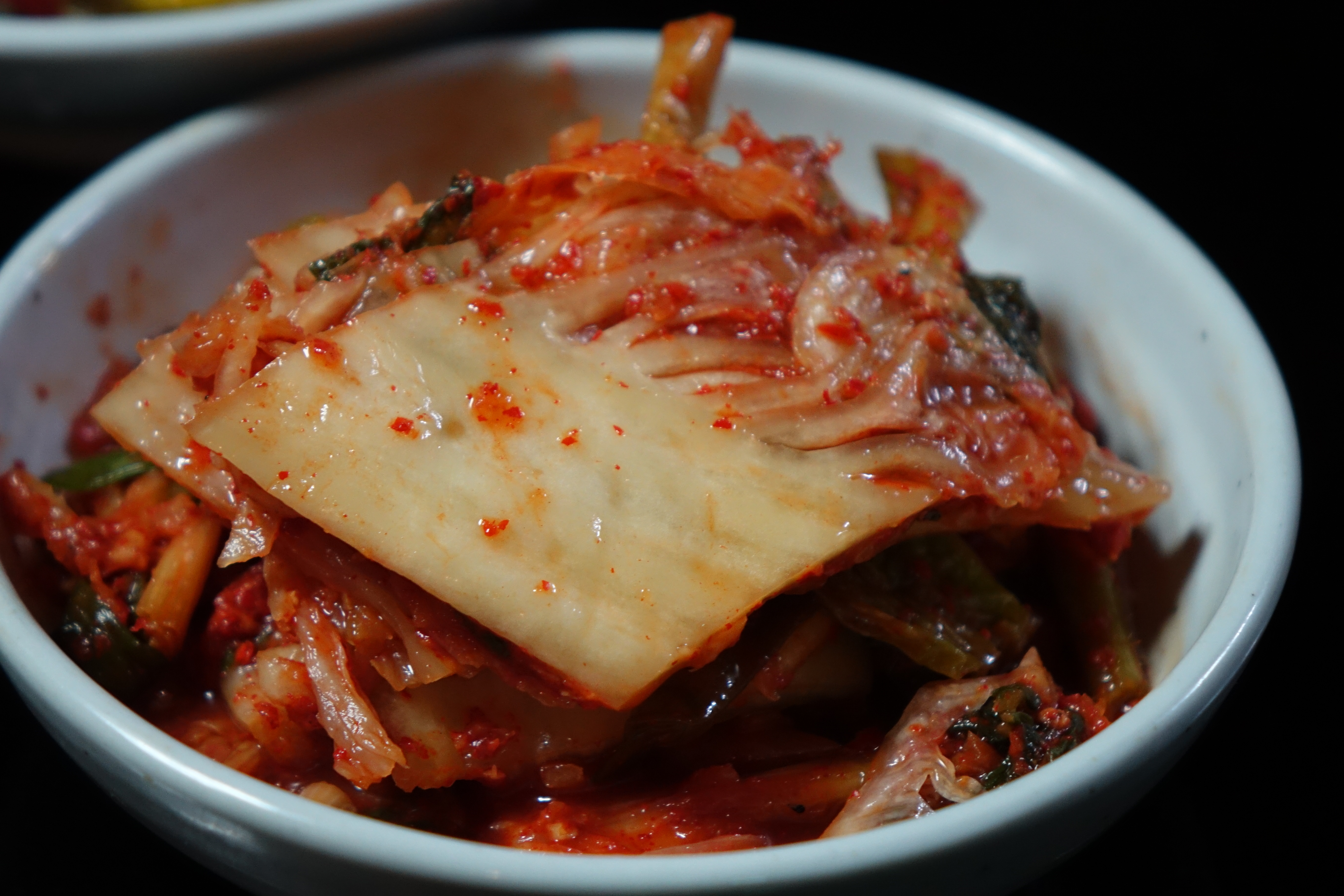 2015년 2월 14일과 2015년 2월 19일 사이 최광모가 촬영한 사진